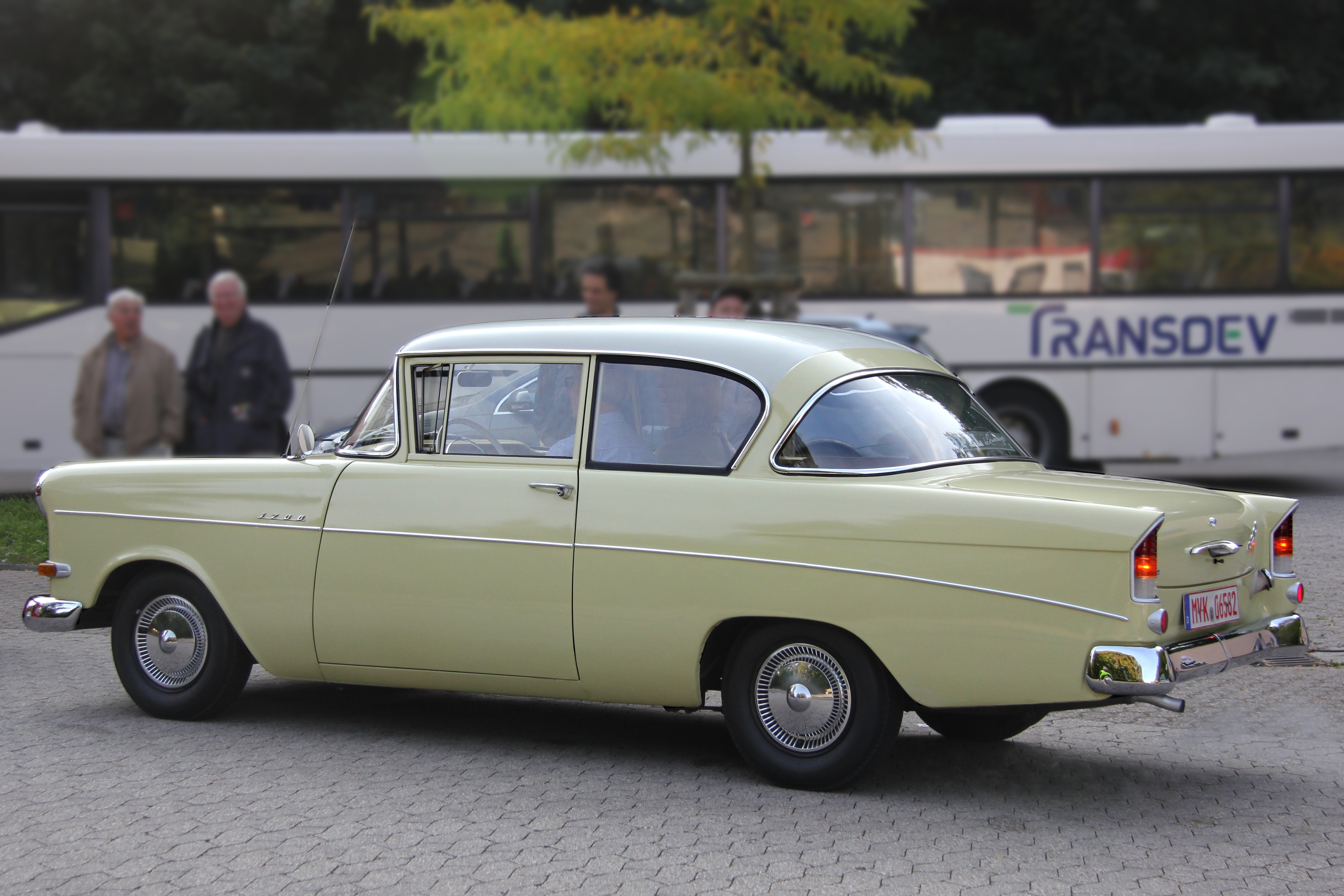 Opel Rekord 1200 (P1), Baujahr 1960, bei der Moselschiefer-Classik in Mayen